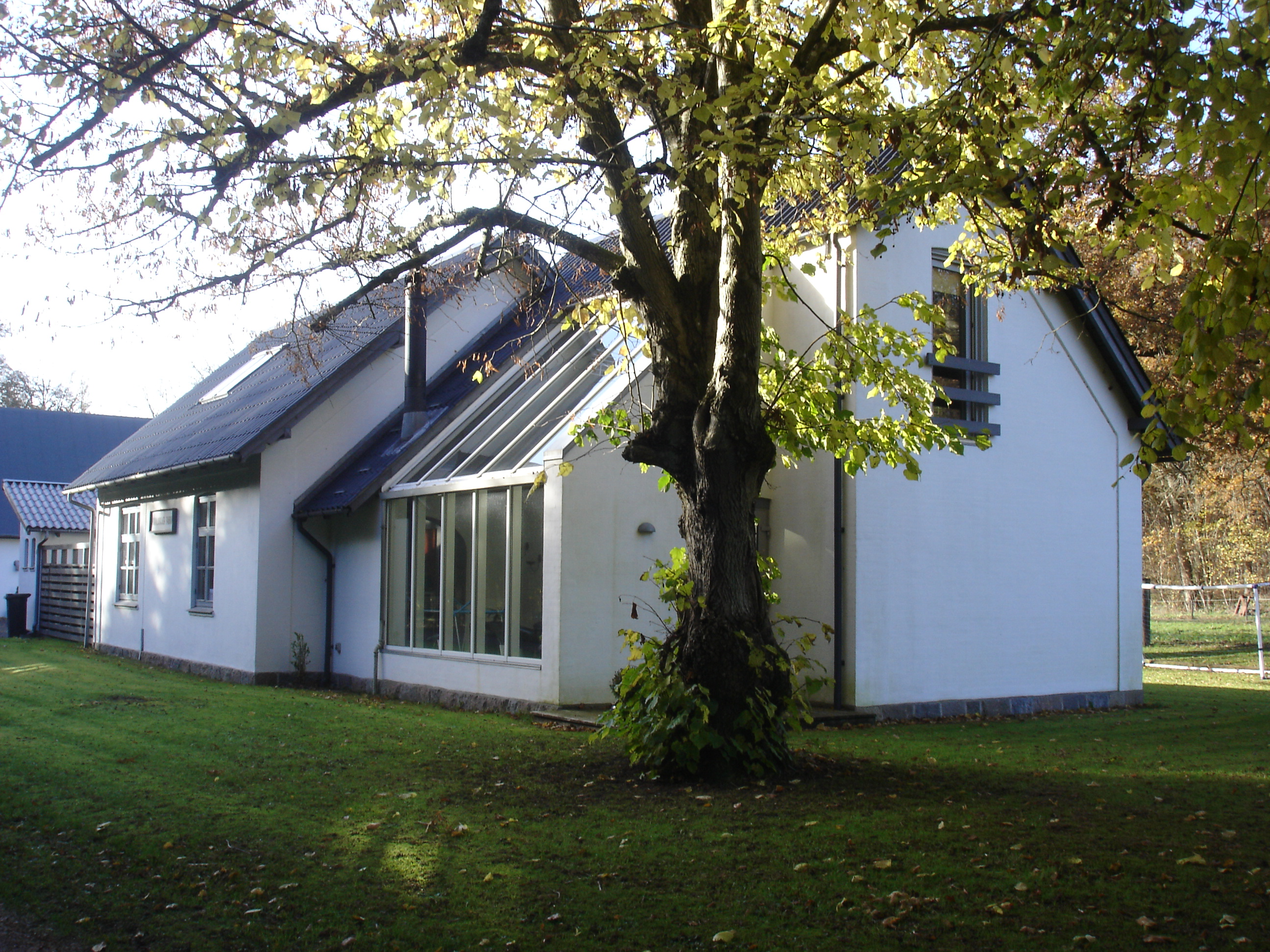 Haraldskær Fabrik Station, sporsiden fra Ø